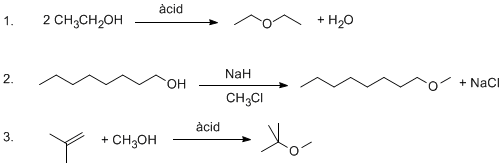 mètodes de preparació d'èters. 16/10/06